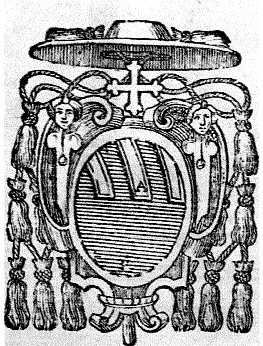 Armes de Ludovico Ludovisi